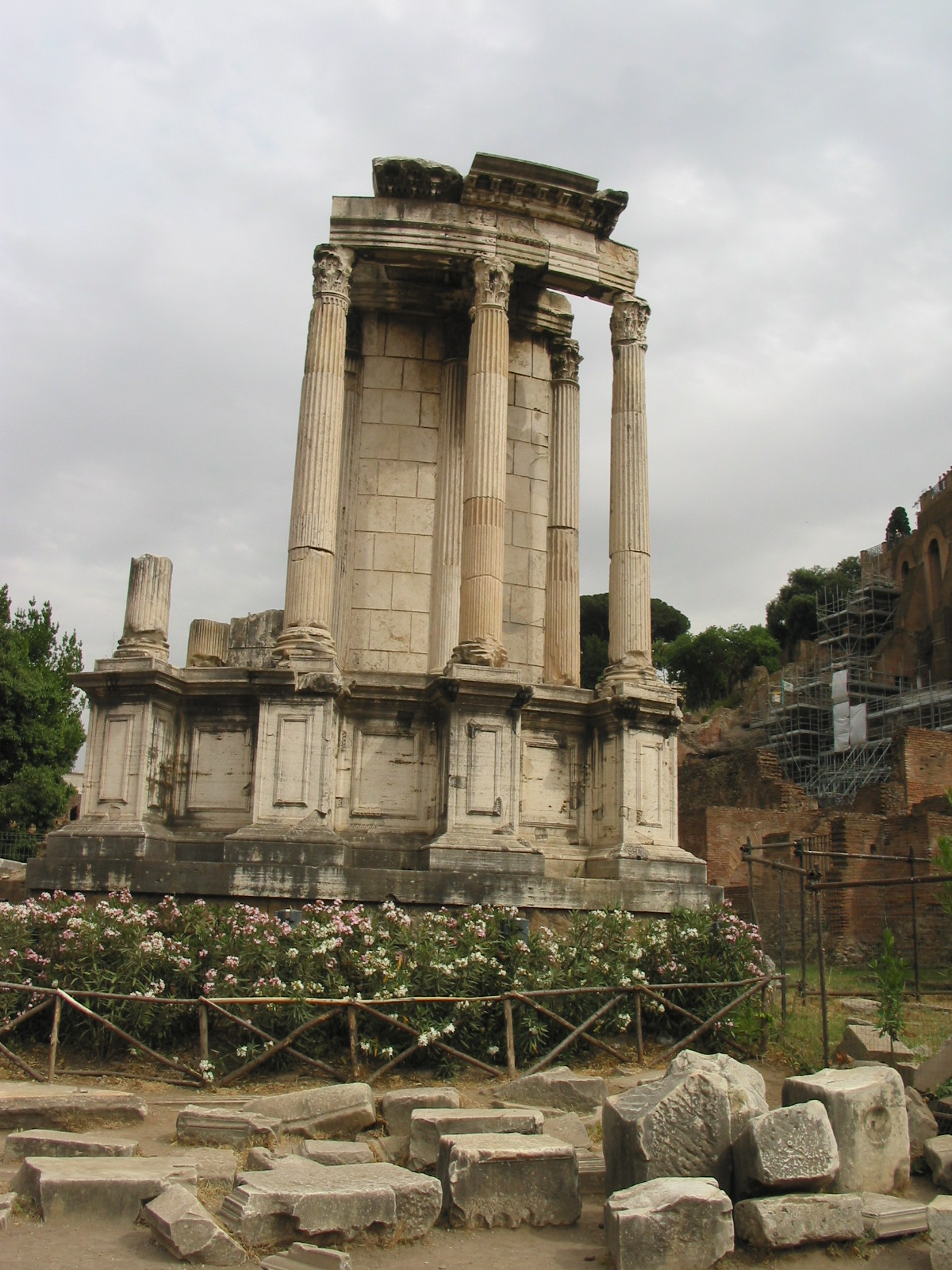 Resti del Tempio di Vesta nel Foro di Roma.